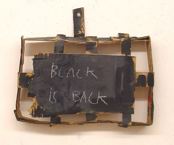 peinture